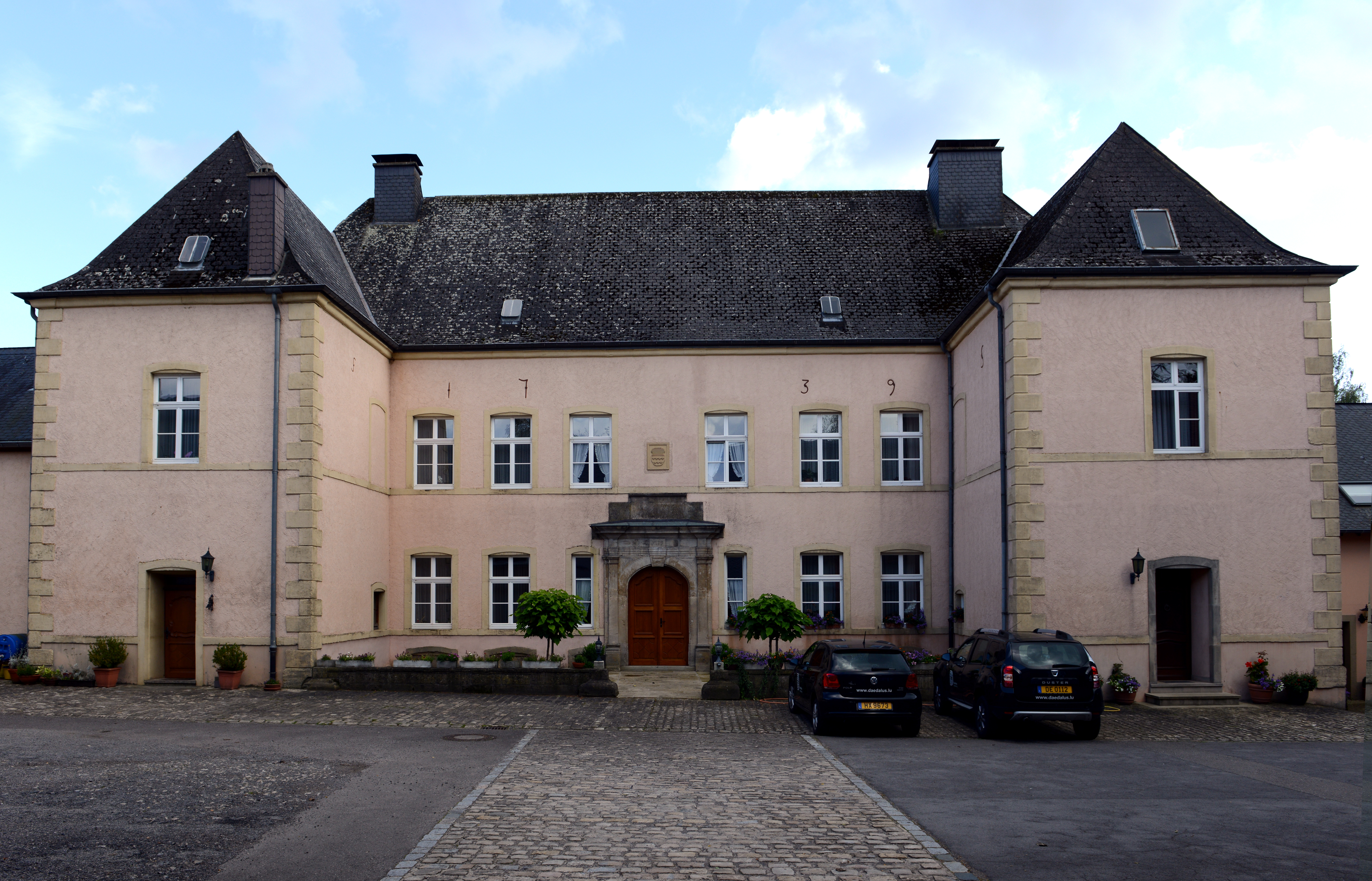 D'Schlass an de Bannenhaff vum "Steinborner Schlass", 1-3 Um Haff zu Hiefenech.